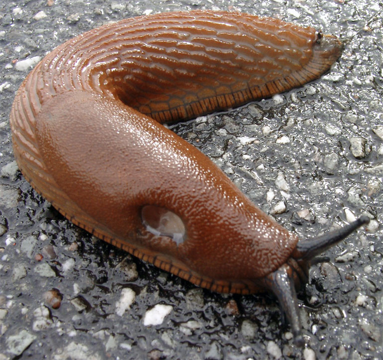 GNU-FDL, selbst fotografiert